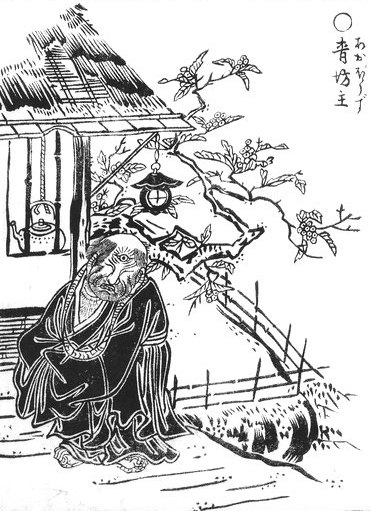 Aobōzu (青坊主) from the Gazu Hyakki Yakō (画図百鬼夜行)